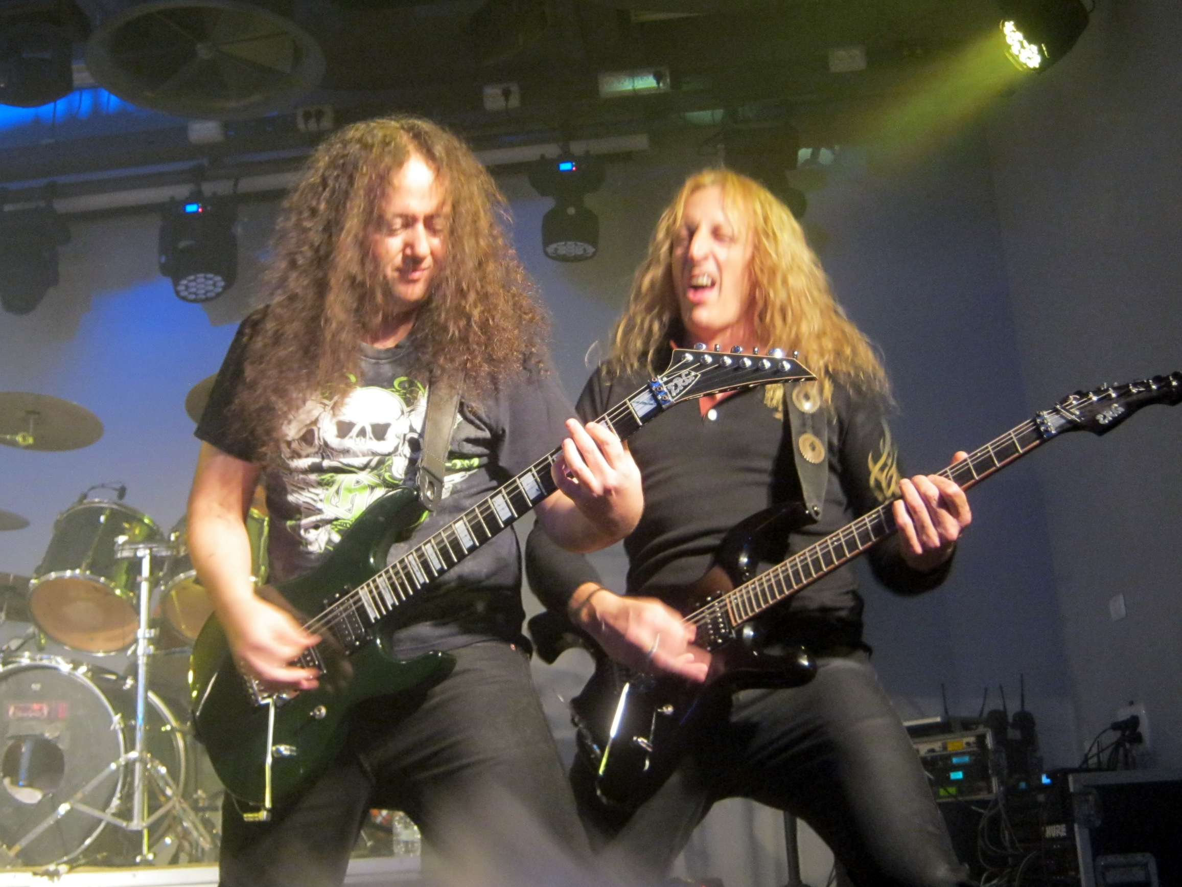 The metal band form Israel "Metal Scent" on 2015